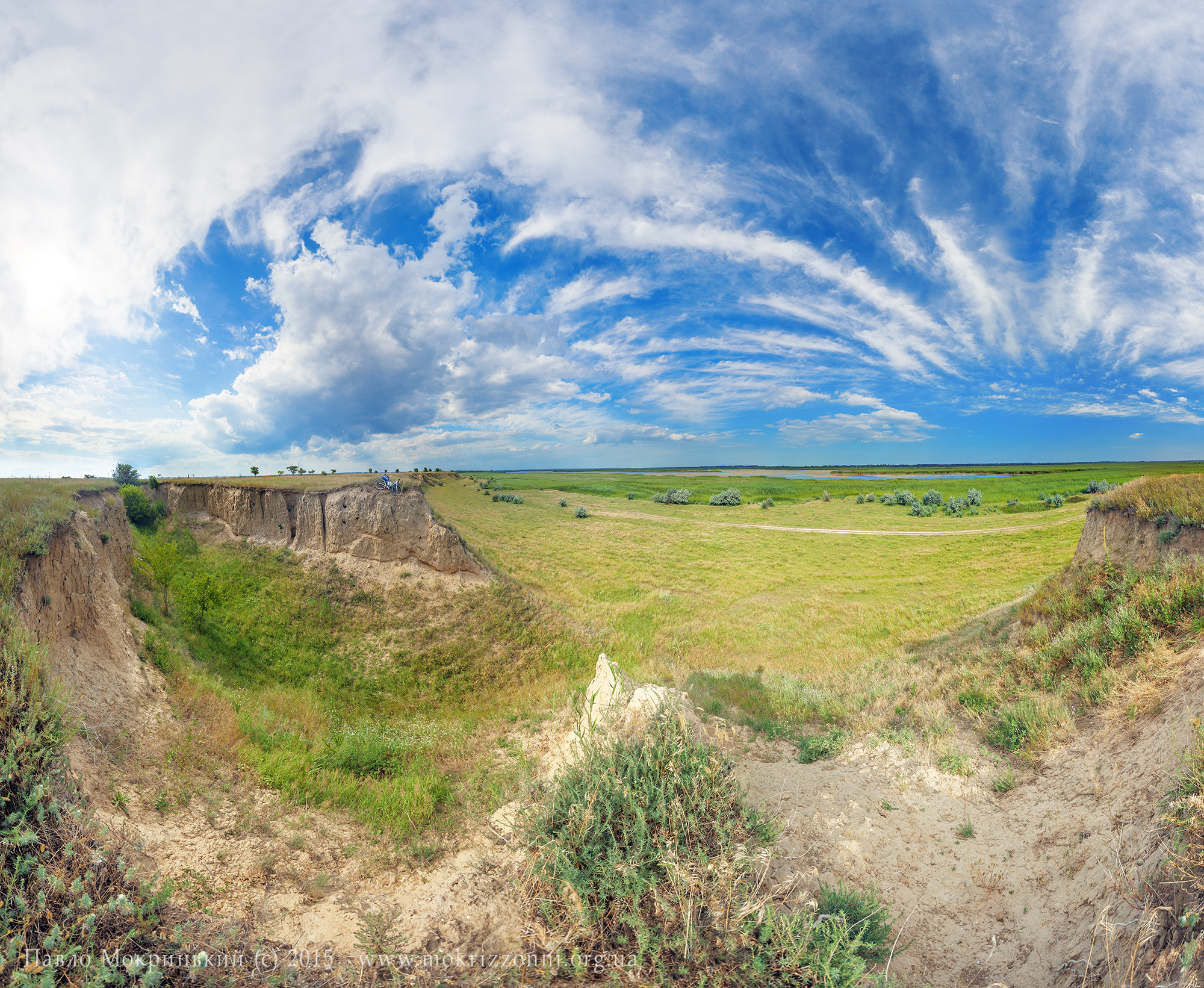 «Лунг», Ізмаїльський р-н, в межах Старонекрасівської, Багатянської, Кислицької сільських рад